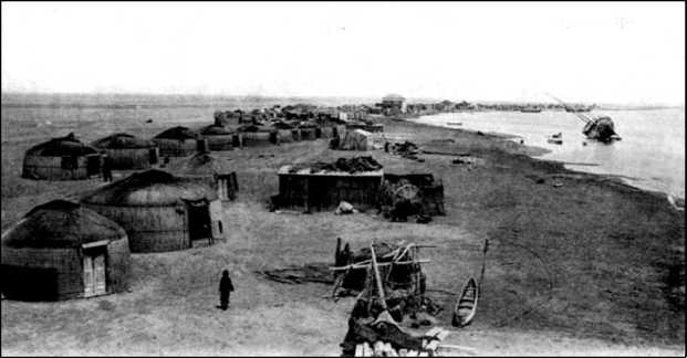 Из описания 1913 года: Остров Челекен отстоит верст на 50 к югу от Красноводска. Попасть туда можно только на туркменской лодке и то в хорошую погоду, так как залив в высшей степени капризен и внезапно налетавшая буря часто причиняет серьезные аварии. На острове добывают превосходную нефть, озокерит и асфальт (кира)